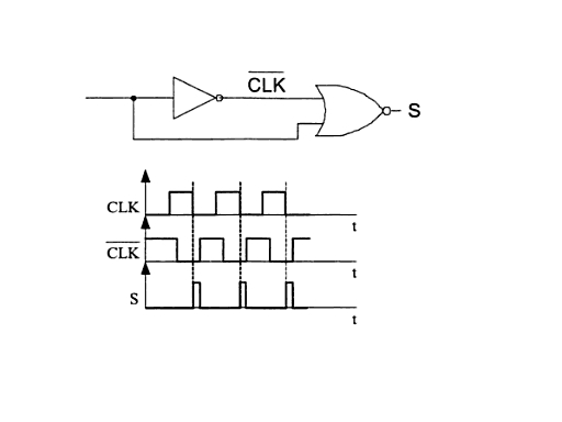 Comportamiento de un detector de flanco de bajada